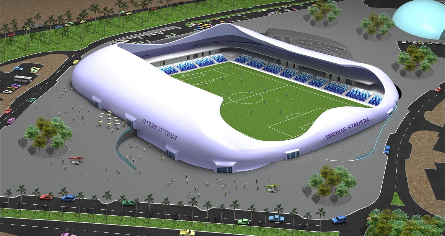 Bodek Architects Tiberias Football Stadium